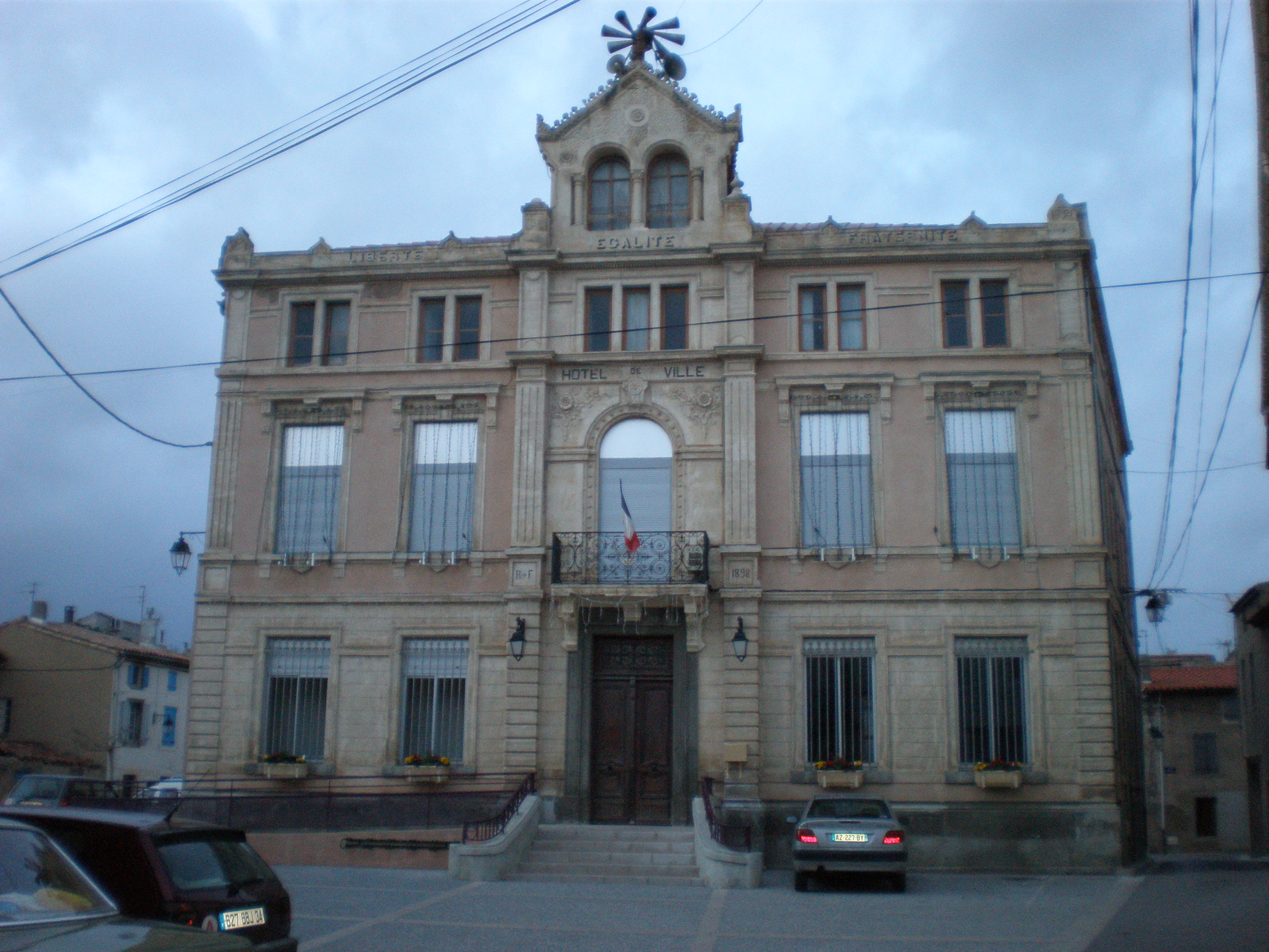 Mairie de la commune d'Olonzac (Hérault, France)